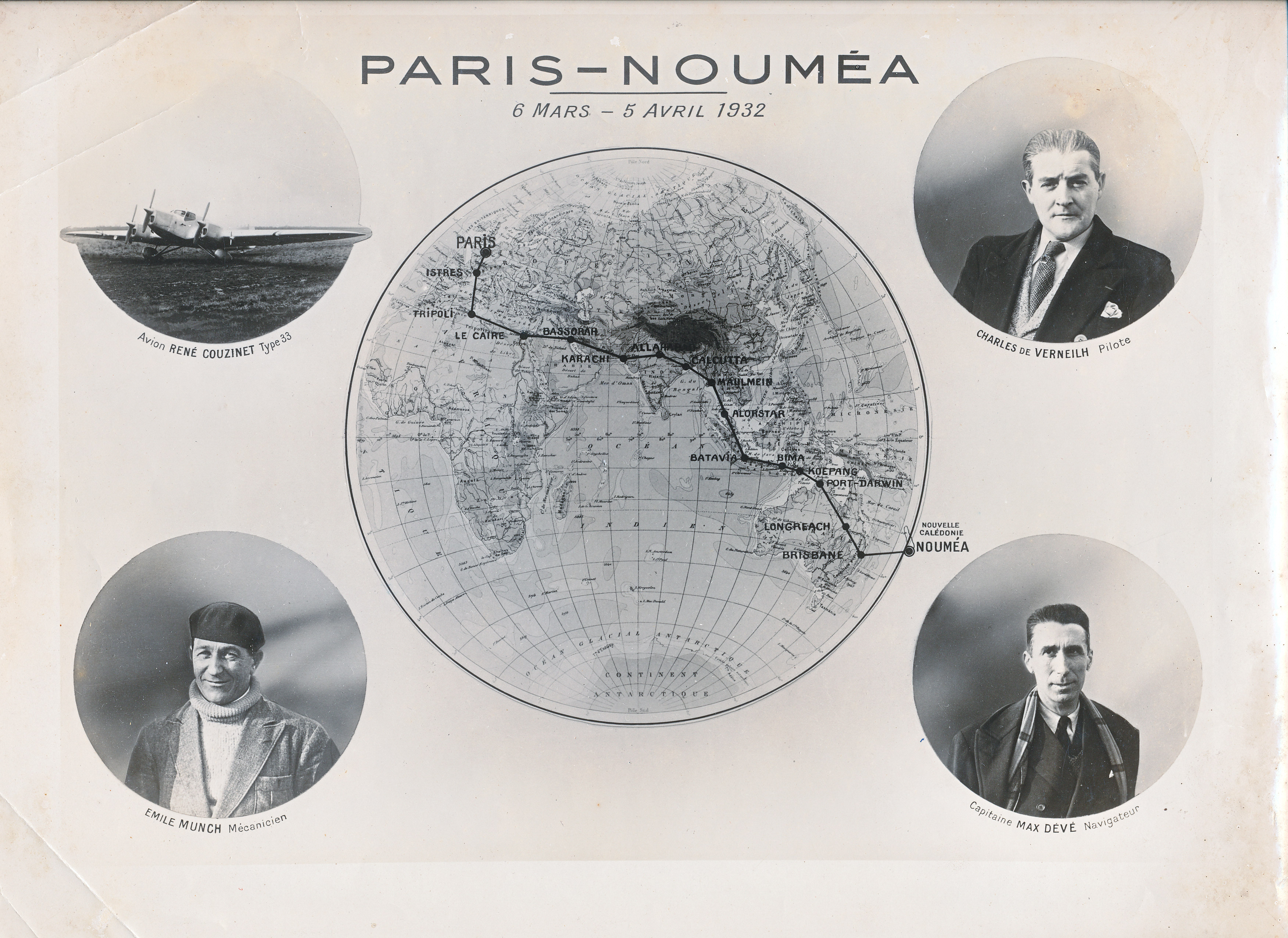 Photomontage